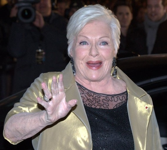 Line Renaud aux NRJ Music Awards